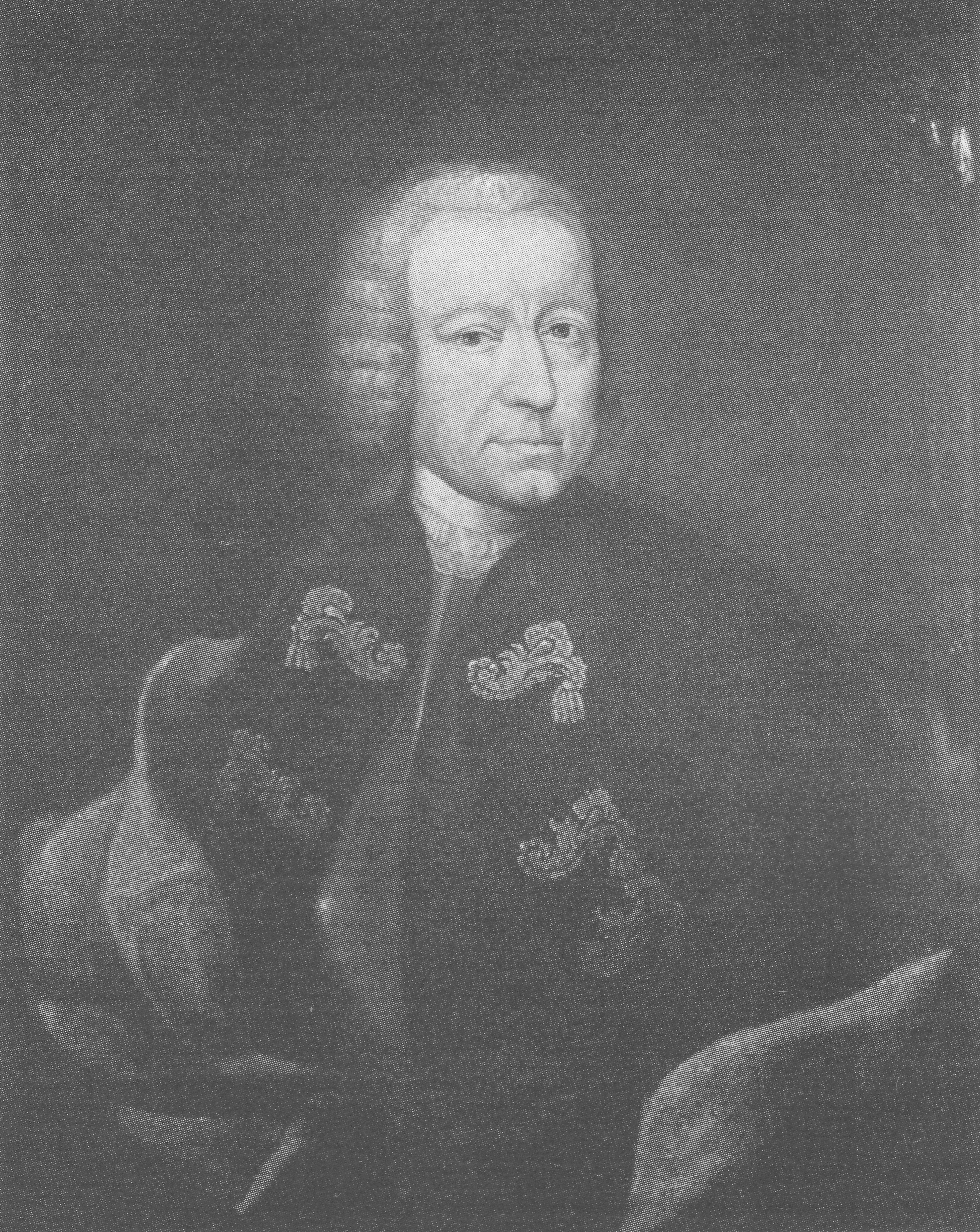 Johann Friedrich Fridolin von Kageneck (1707-1783)